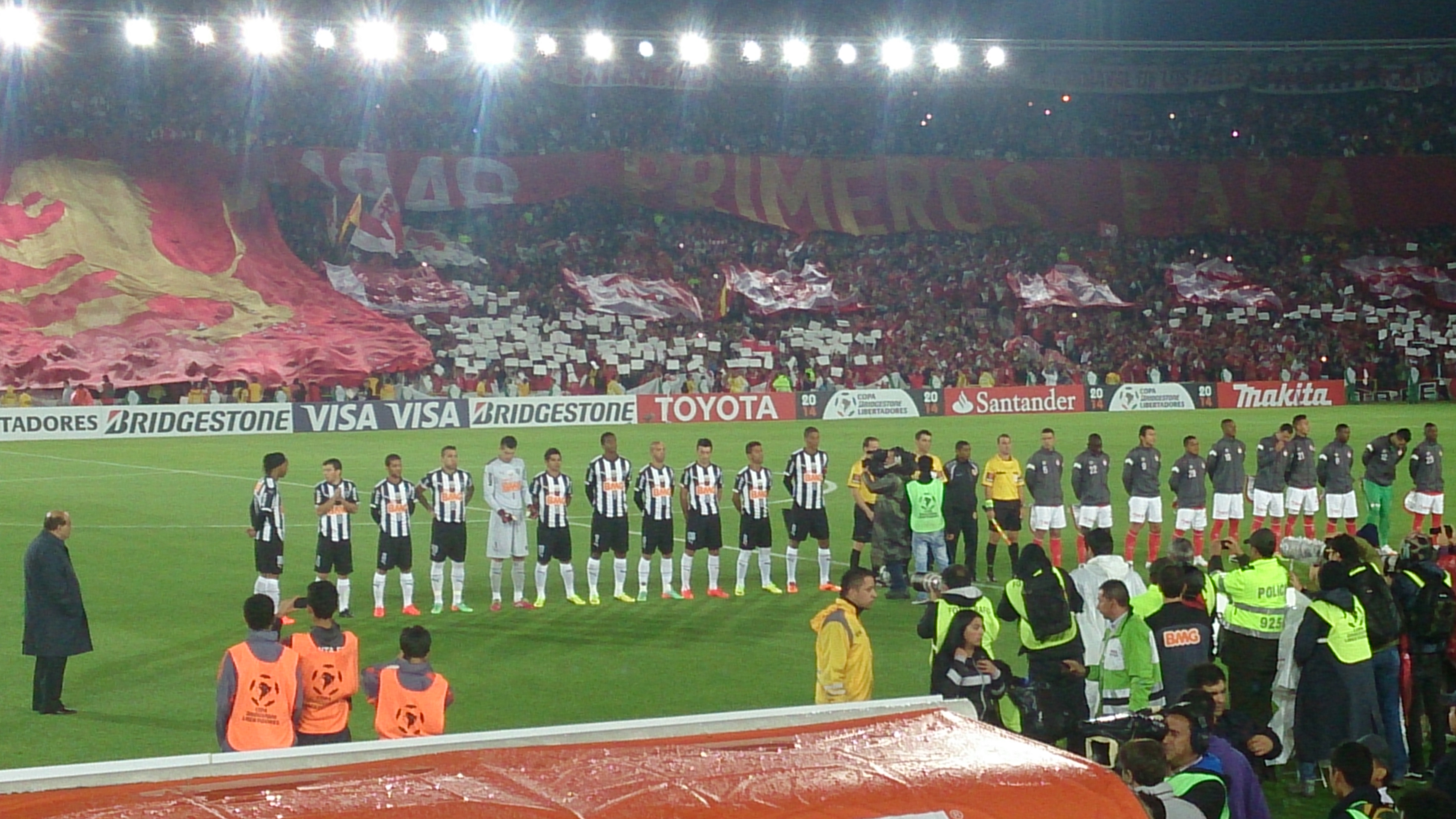 Formaciones iniciales del partido correspondiente a la quinta fecha del Grupo 4 de la Segunda fase de la Copa Libertadores, previo a iniciar el partido. 3 de abril de 2014. Santa Fe 1-1 Atlético Mineiro, estadio Nemesio Camacho El Campín. Copa Libertadores 2014.